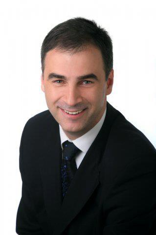 Иван Стоилковић